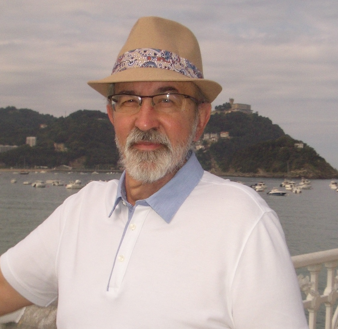 Fotografía del escritor español Ricardo Serna. Fue tomada en San Sebastián en 2014.